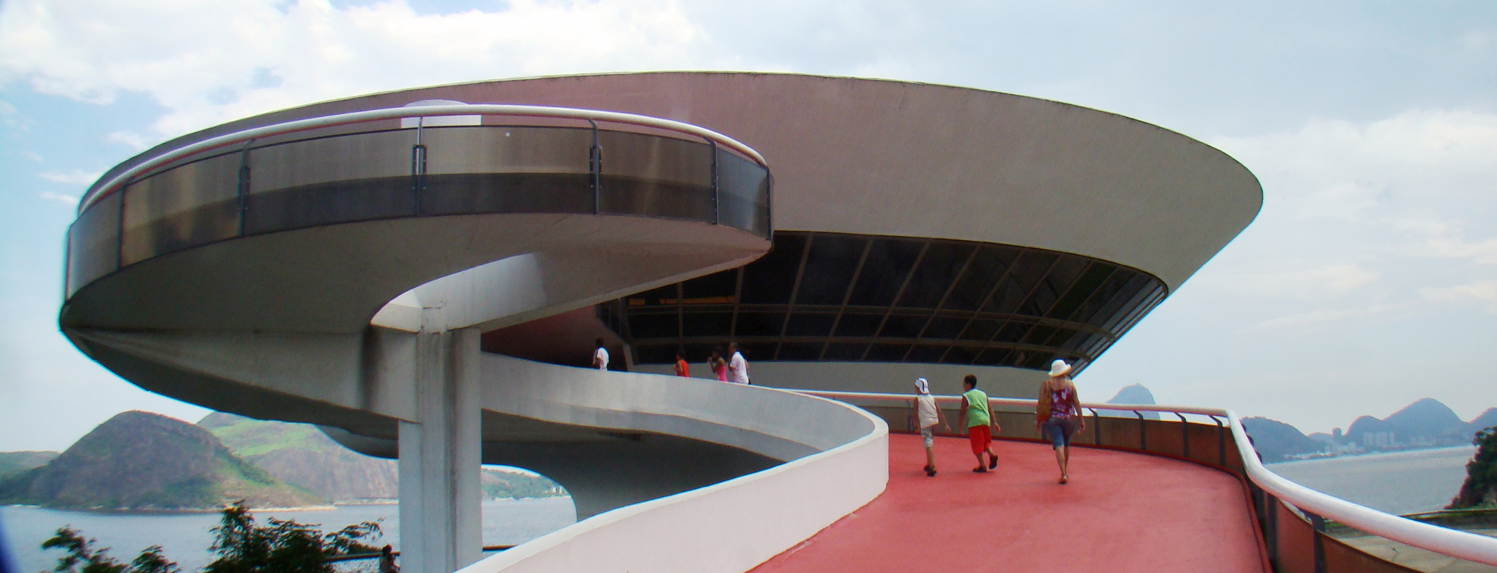 Niterói Contemporary Art Museum